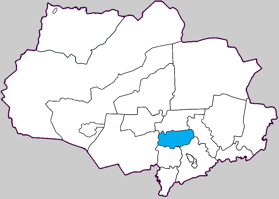 Кривошеинский район Томской области